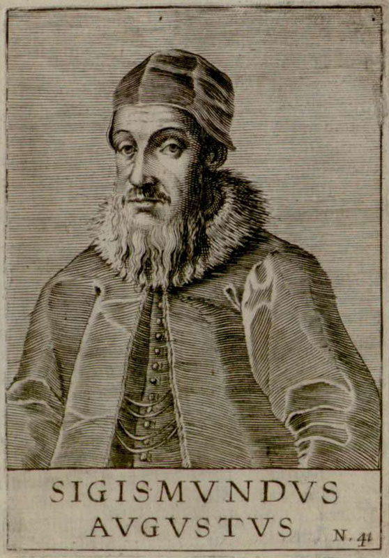 Беларуская (тарашкевіца): Партрэт караля і вялікага князя Жыгімонта Аўгуста (Žygimont Aŭgust)